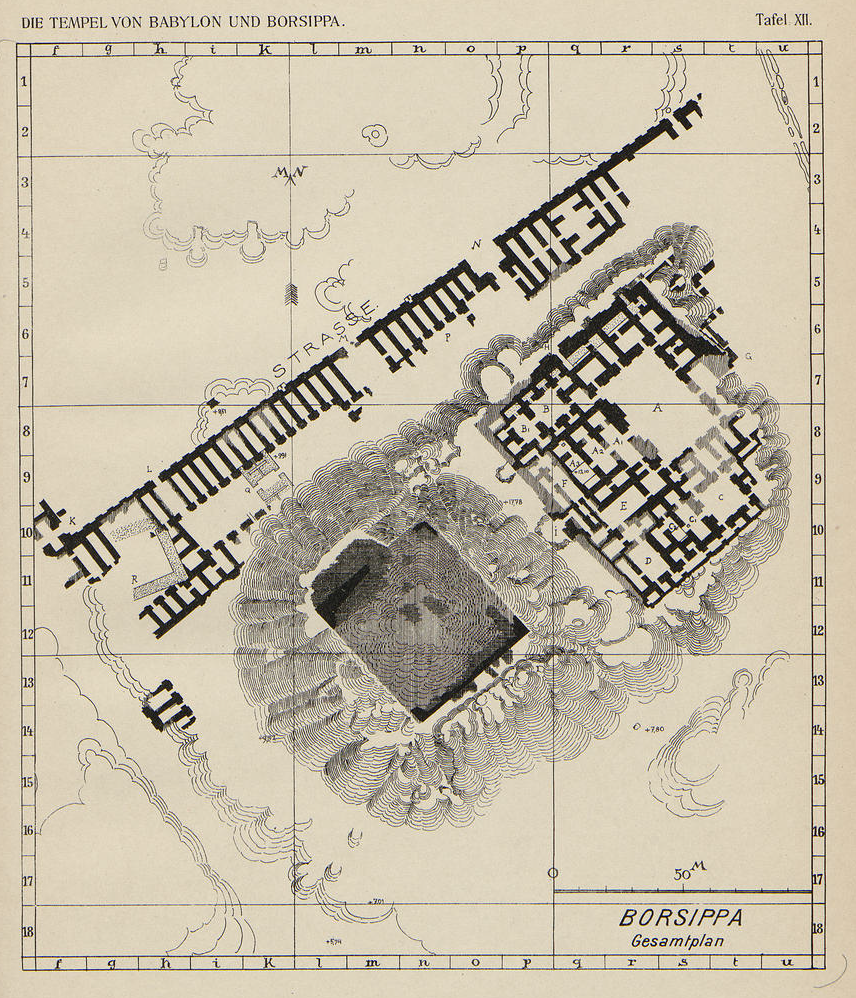 Plan des secteurs de l'Ezida, temple de Nabû, dégagés à Birs Nimrud, l'antique Borsippa, lors des fouilles dirigées par Robert Koldewey. Extrait de R. Koldewey, Die Tempel von Babylon und Borsippa: nach den Ausgrabungen durch die Deutsche Orient-Gesellschaft, Leipzig, 1911, tafel XII.